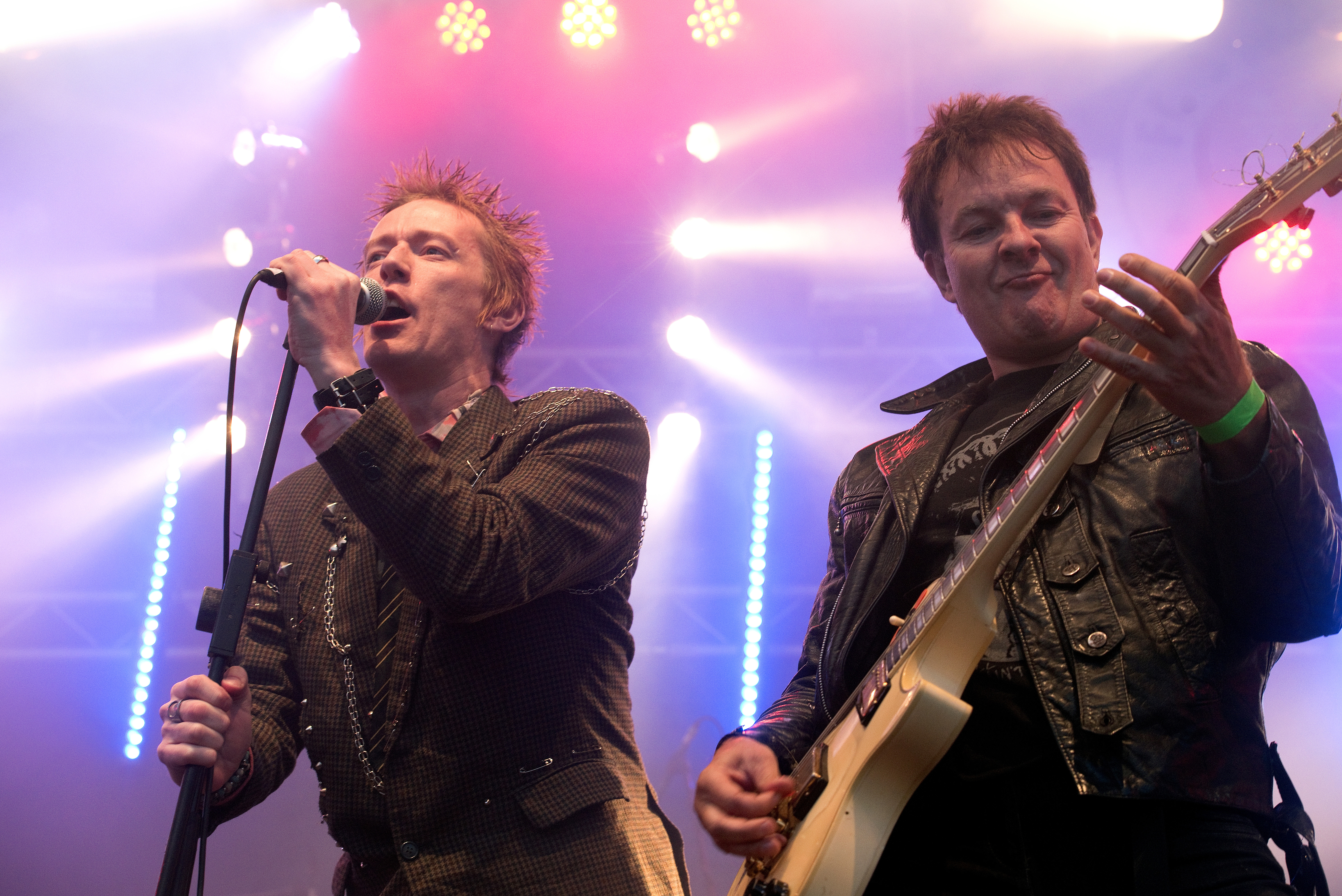 The Sex Pistols Experience beim Hafen Rock 2016 in Hamburg